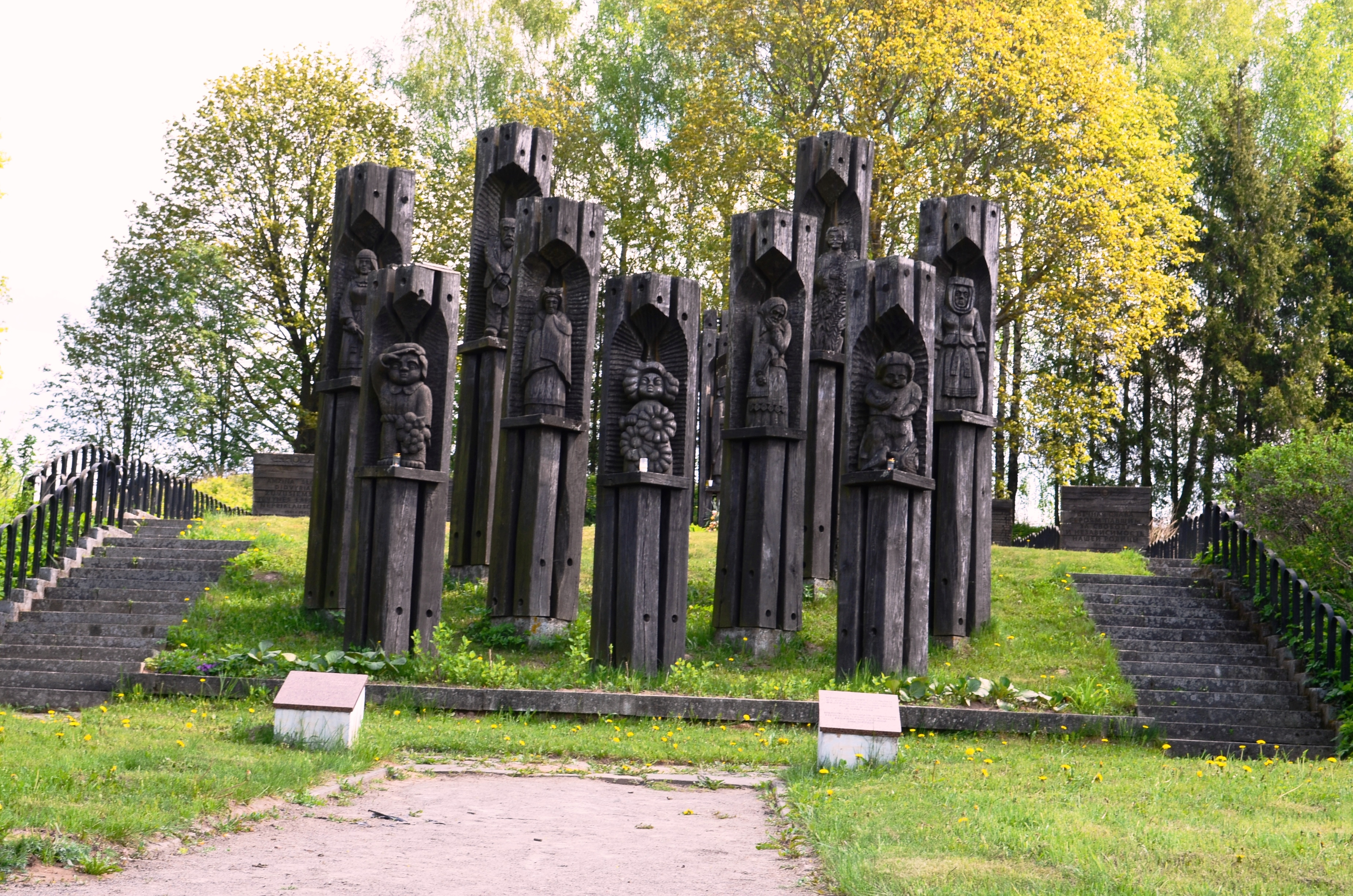 Tarybinis memorialas, Bendoriai, Vilniaus raj.